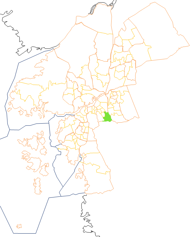 Karta som visar primärområdes belägenhet i Göteborg